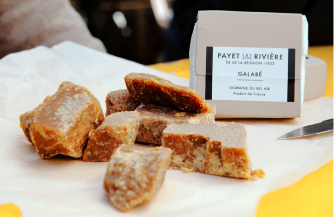 Le Galabé proposé par Payet [&] Rivière